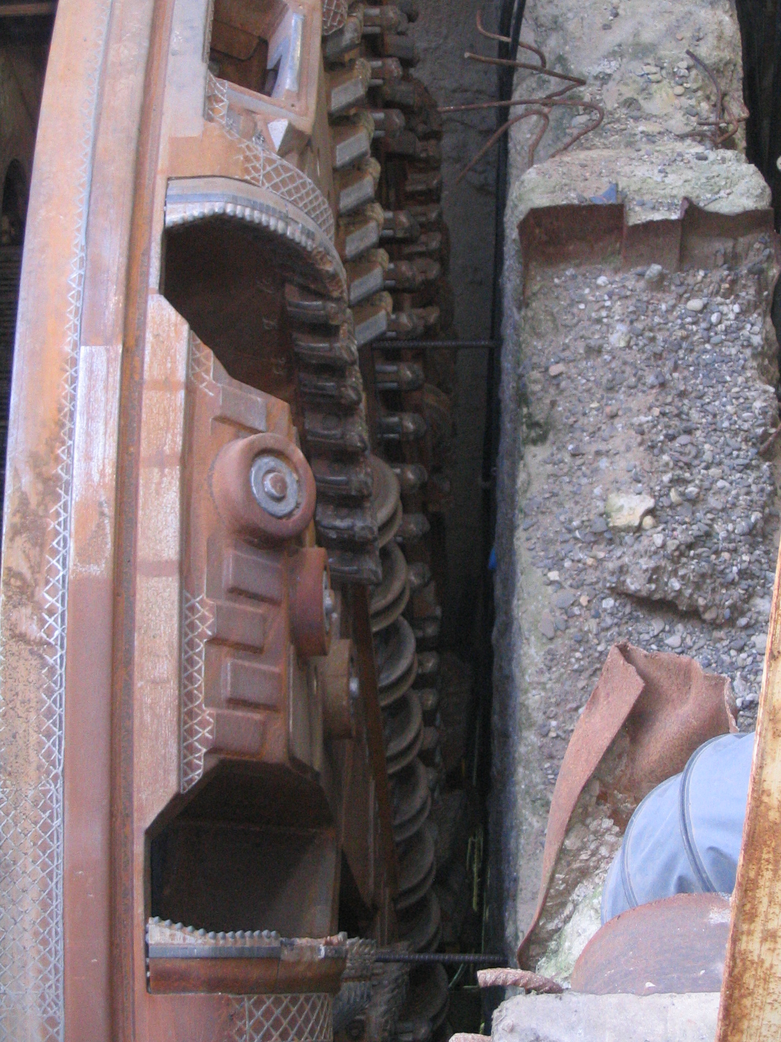 Bau des U-Bahn-Tunnels für die Wehrhahnlinie, Düsseldorf. Januar 2012 Der Bohrkopf wird auf dem Wehrhahn abgebaut.